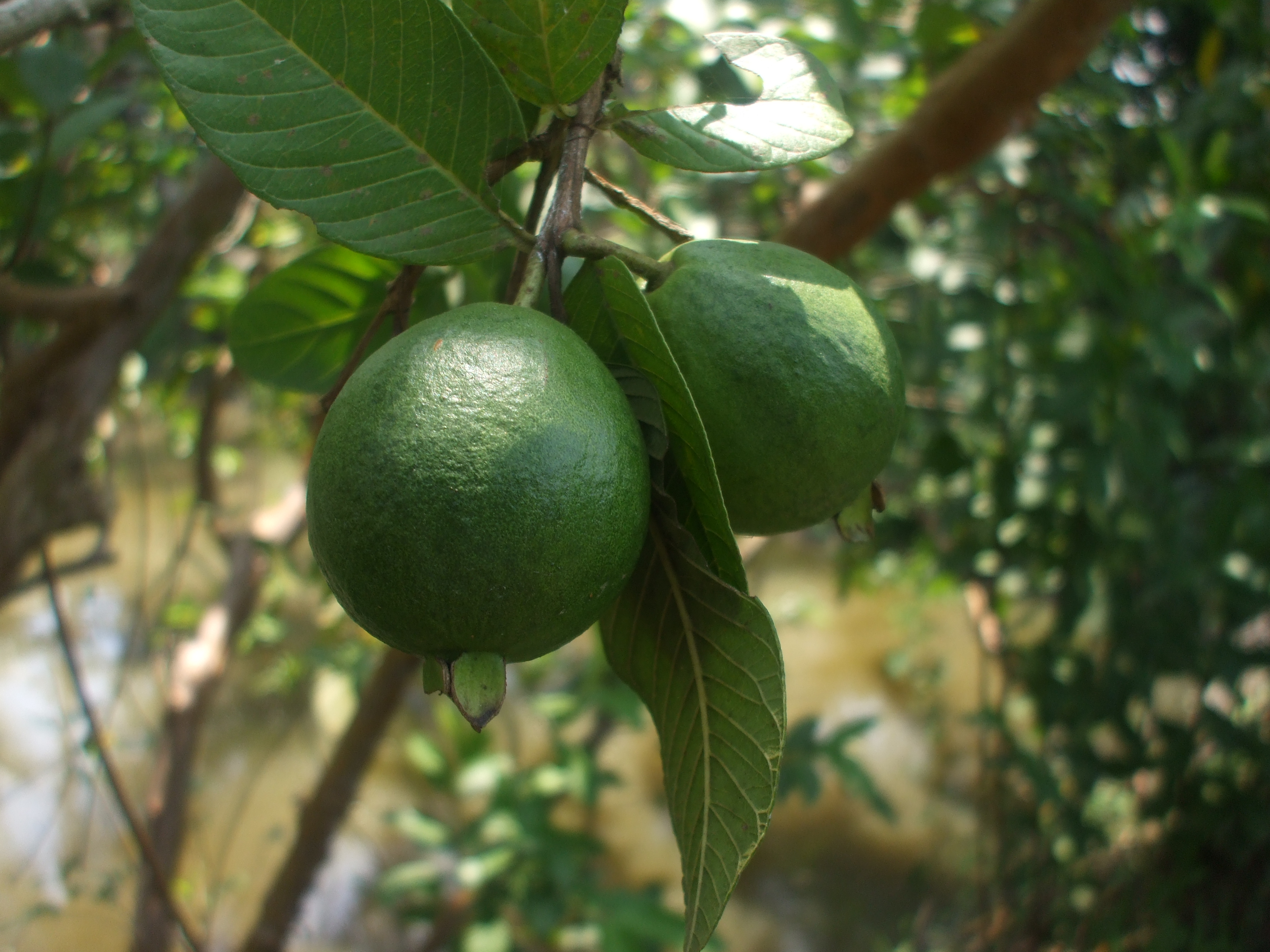 Quả ổi